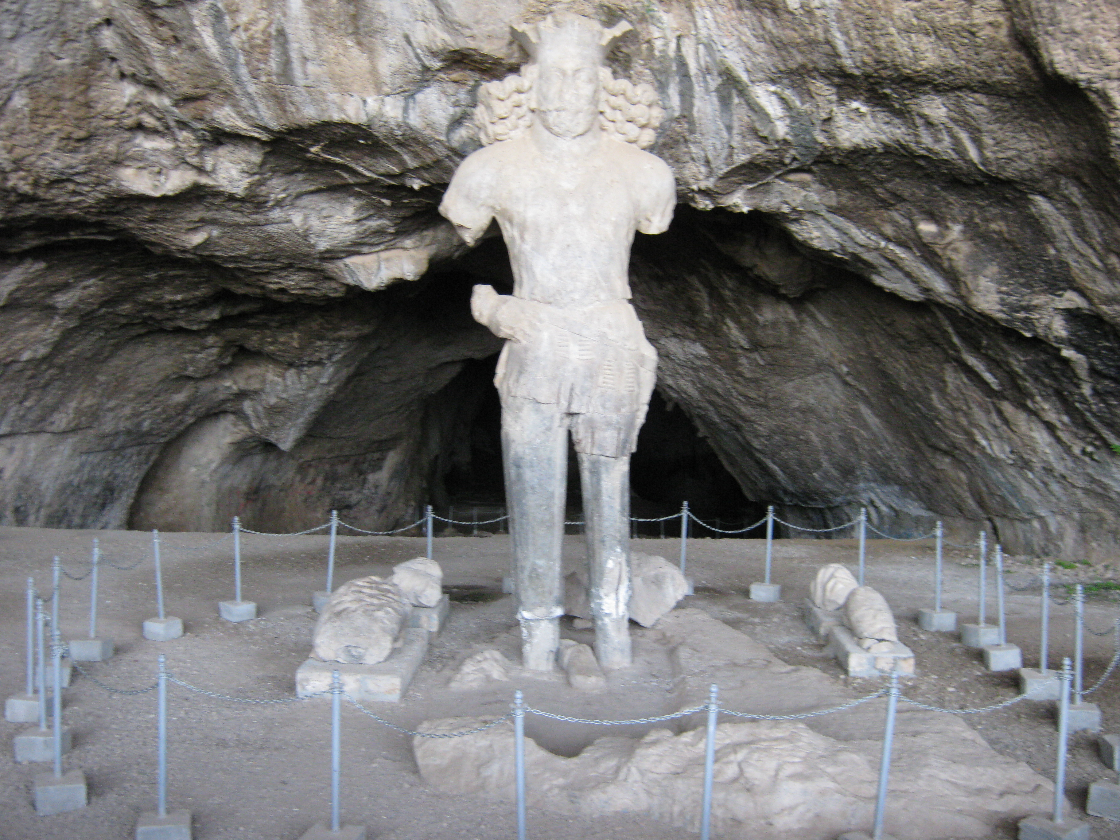 Ghar Shapour-غار شاپور